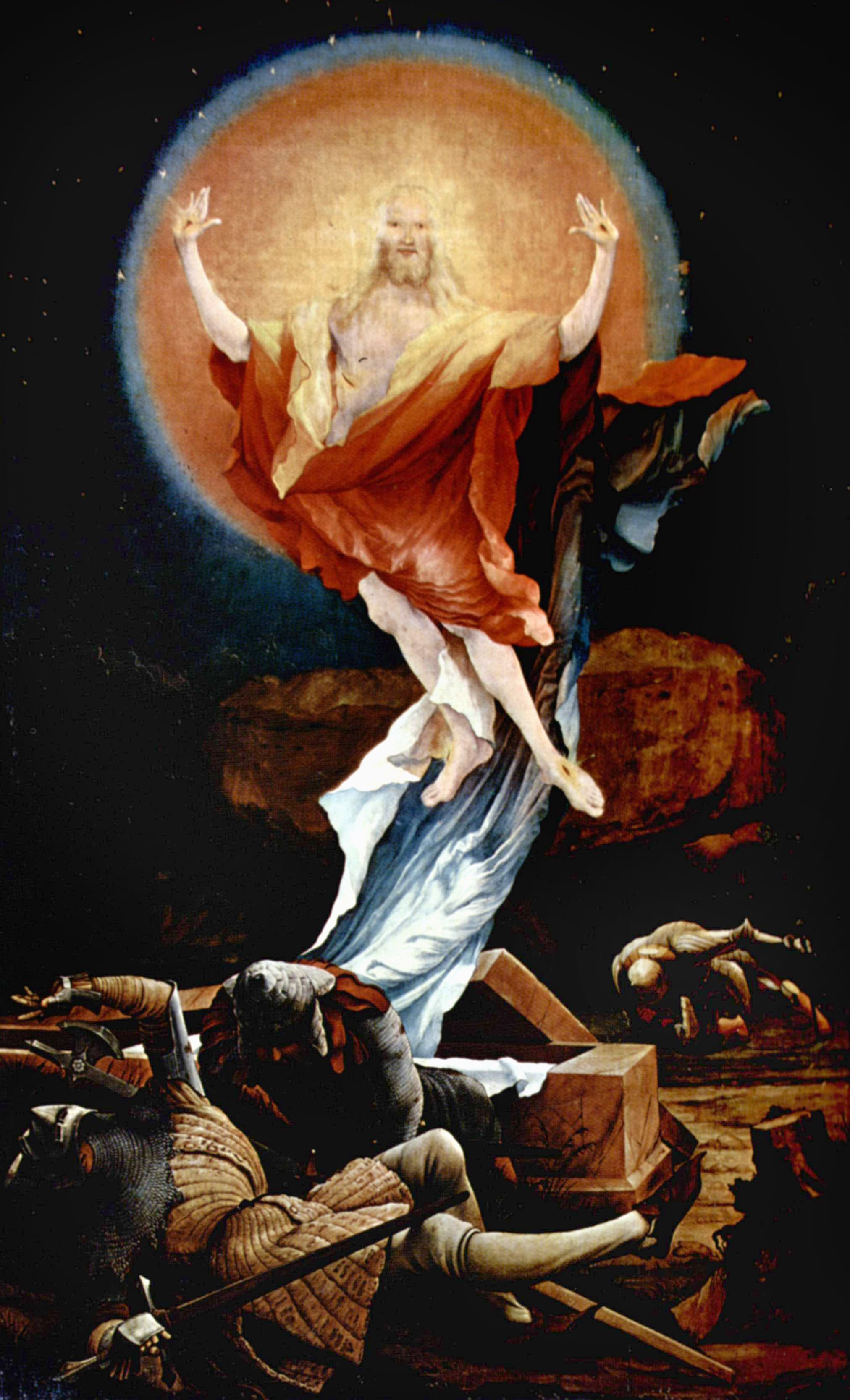 Isenheimer Altar, ehemals Hauptaltar des Antoniterklosters in Isenheim/Elsaß, zweite Schauseite, rechter Flügel: Auferstehung. Musée d'Unterlinden, Deutschland